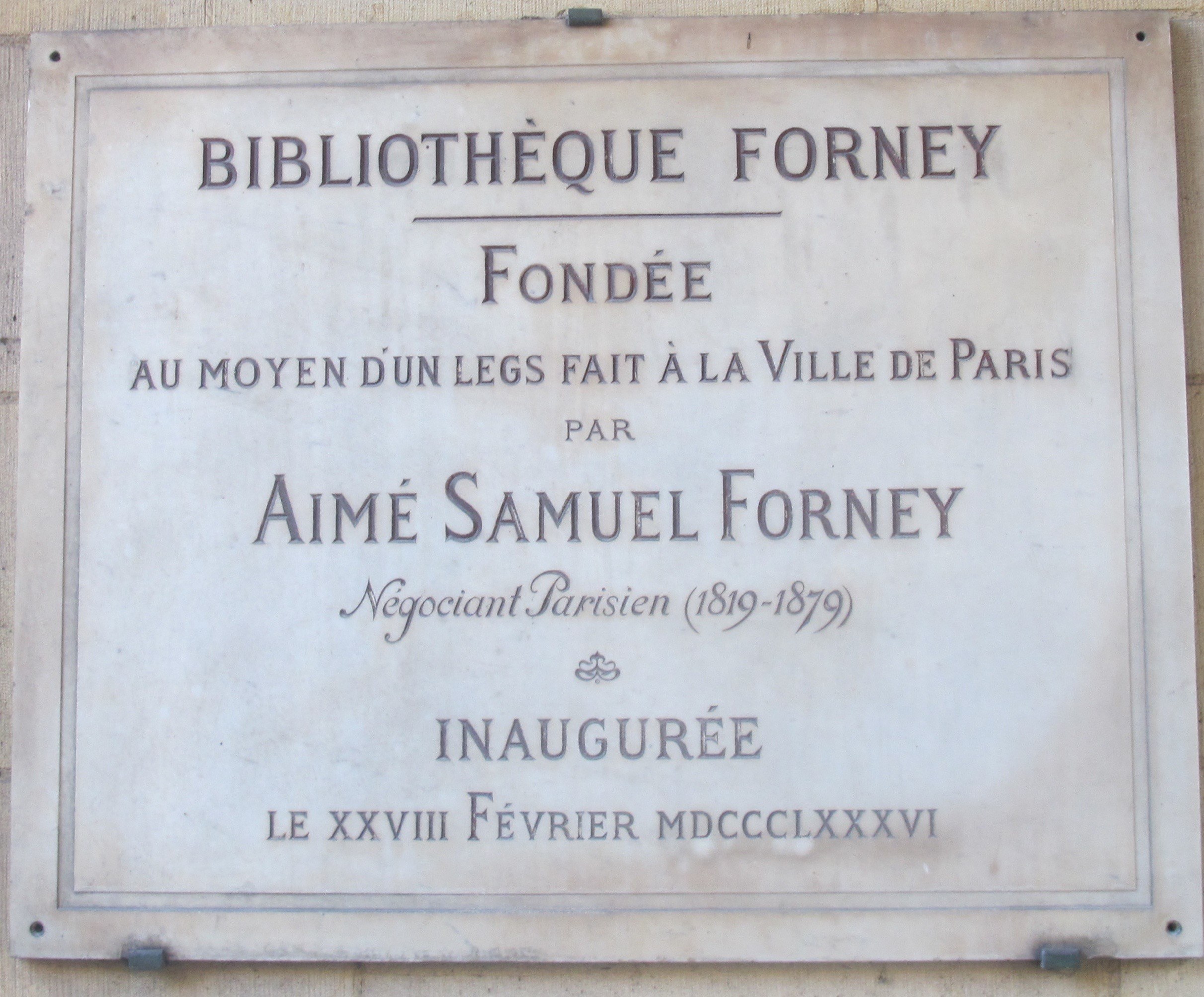 Plaque sur la fondation de la bibliothèque Forney, situé au début de la cour de l'hôtel de Sens (Paris, 4e).